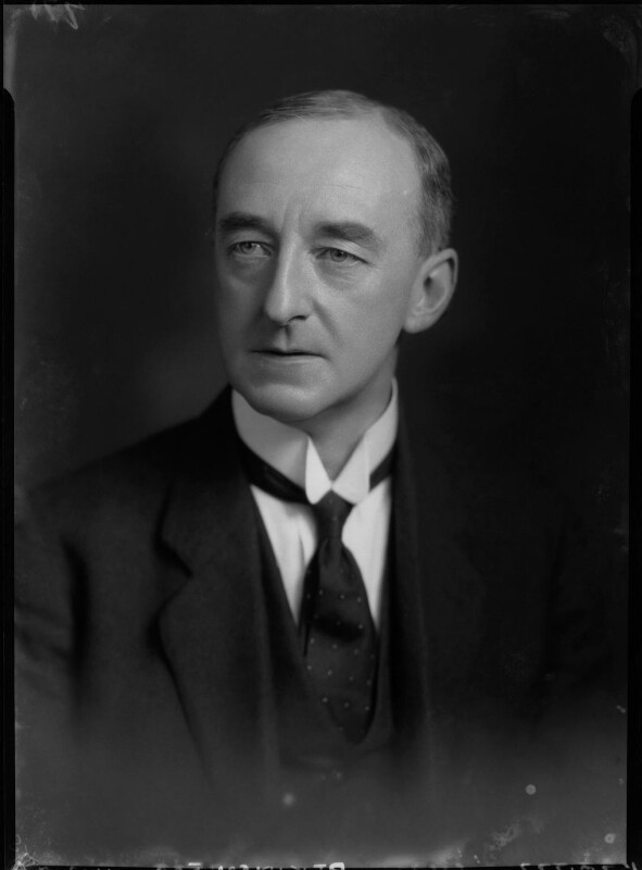 Cyril Atkinson